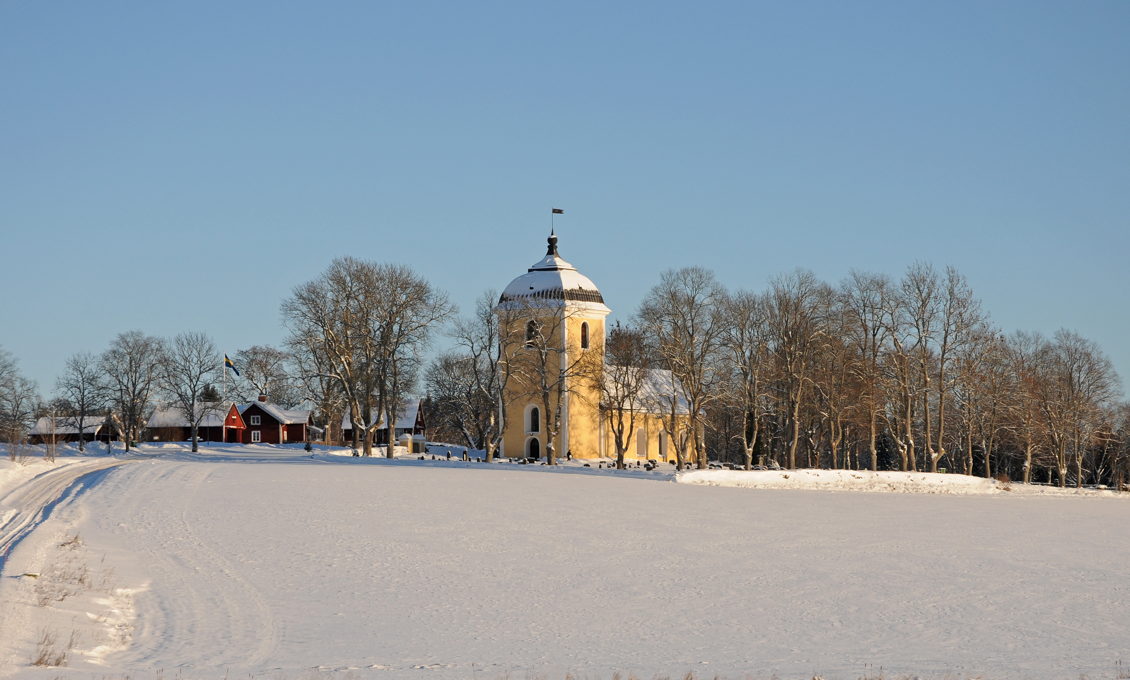 Tystberga sockenkyrka i december 2010